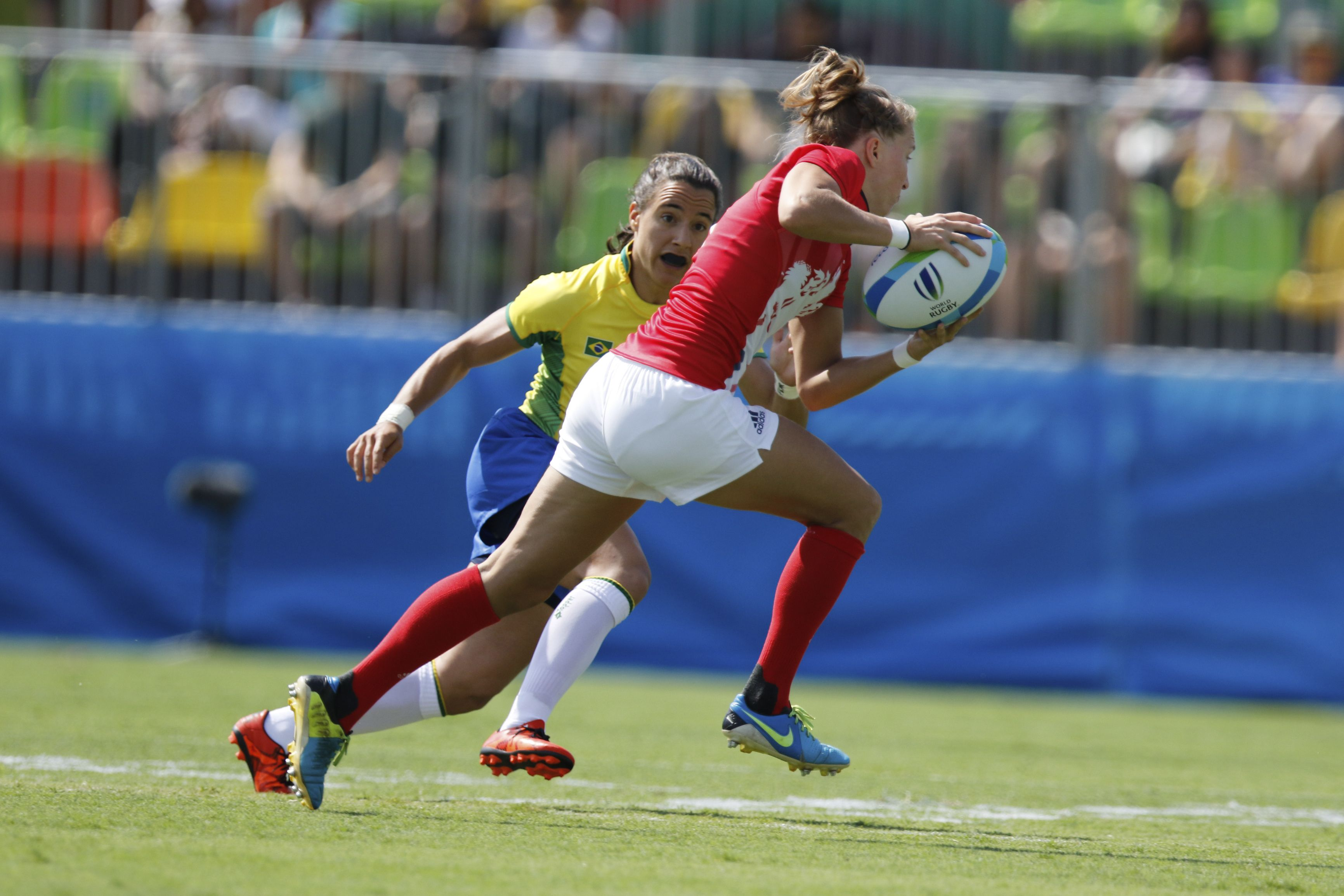 Rio de Janeiro - Brasil é derrotado por 29 a 3 pela Grã-Bretanha na estreia do rugby feminino nos Jogos Olímpicos Rio 2016